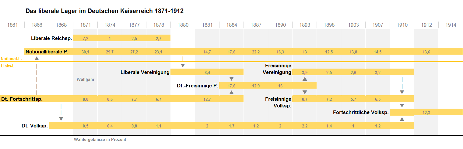 Wahlergebnisse liberaler Parteien im Deutschen Kaiserreich 1871-1912 in Prozent / Übersicht Spaltungen und Zusammenschlüsse